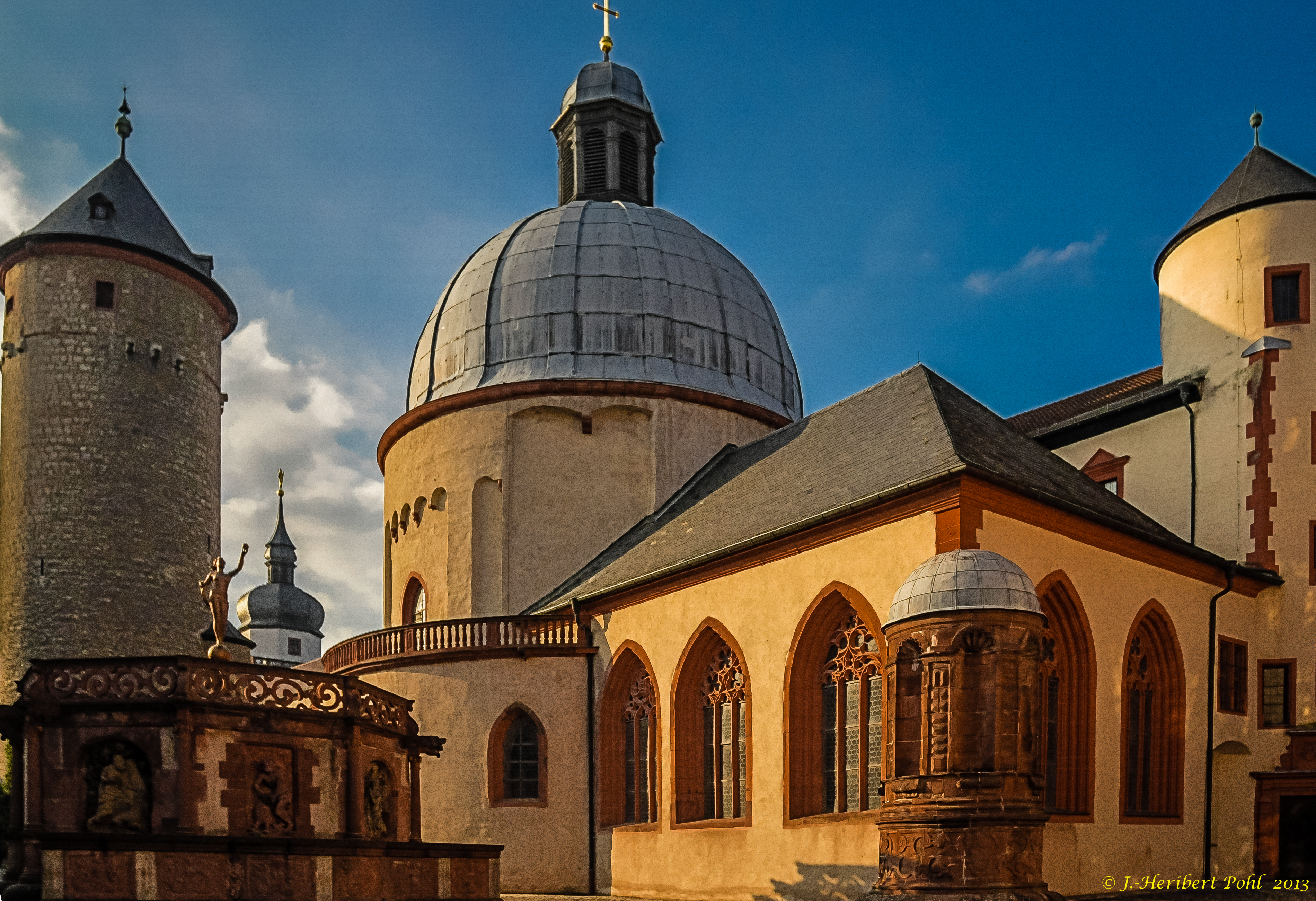 Seit 1250 war die Festung Marienberg der Sitz der Würzburger Bischöfe. Diese bauten die mittelalterliche Burg zu barocken Festungsanlage aus. Zwischen den Jahren 1720 bis 1744 wurde die Hofhaltung der Bischöfe in die neue Stadtresidenz verlegt. Von da an bis 1938 wurde die Veste militärisch genutzt. Im Jahre 1945 durch die Bomben der Alliierten stark zerstört, wurde sie in den kommenden Jahrzehnten wieder aufgebaut. Die Baumaßnahmen wurden mit der Eröffnung des Fürstenbaumuseums 1990 abgeschlossen ( Infotafel in der Festung )